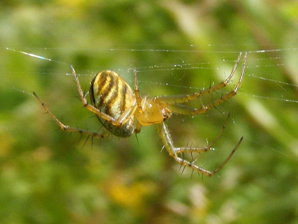 Mangora gibberosa : Photographié dans la région montréalaise le 27 août 2010, sur Fujifilm FinePix S700.